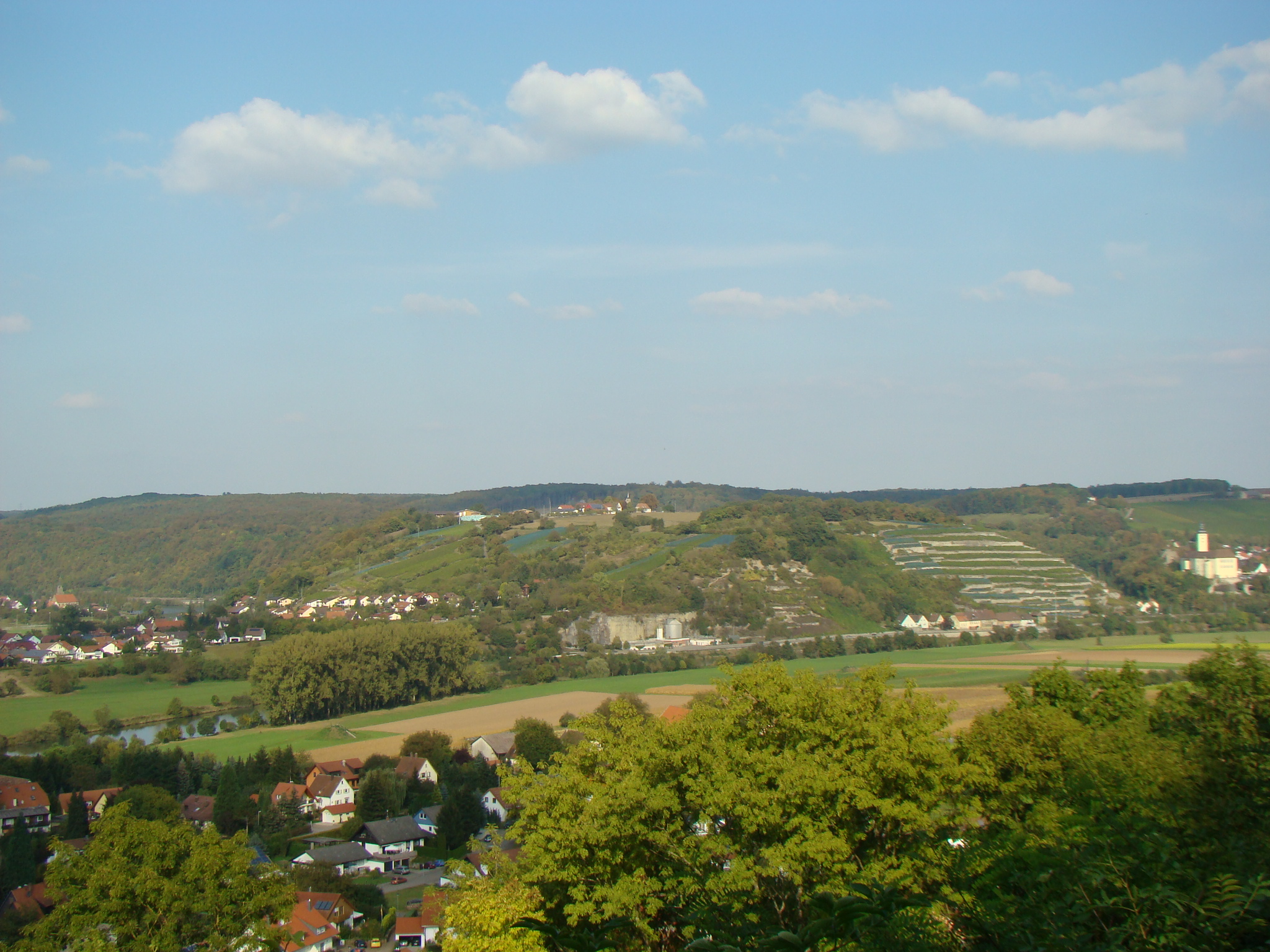 Michaelsberg bei Gundelsheim (Württ.)